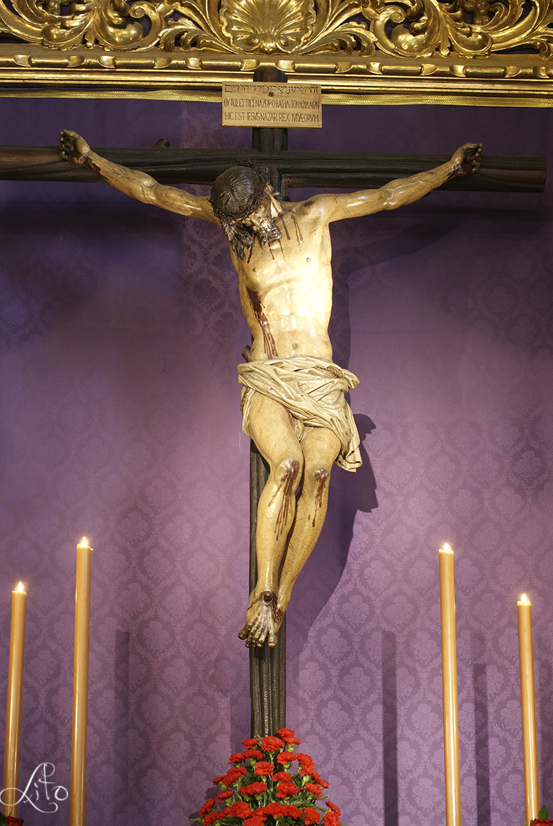 Fotografia realizada por Manuel Francisco Álvarez Ruiz.